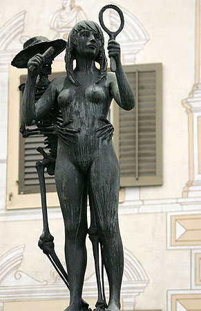 Stans: Skulptur "Das Mädchen mit dem Tod" beim Dorfplatz